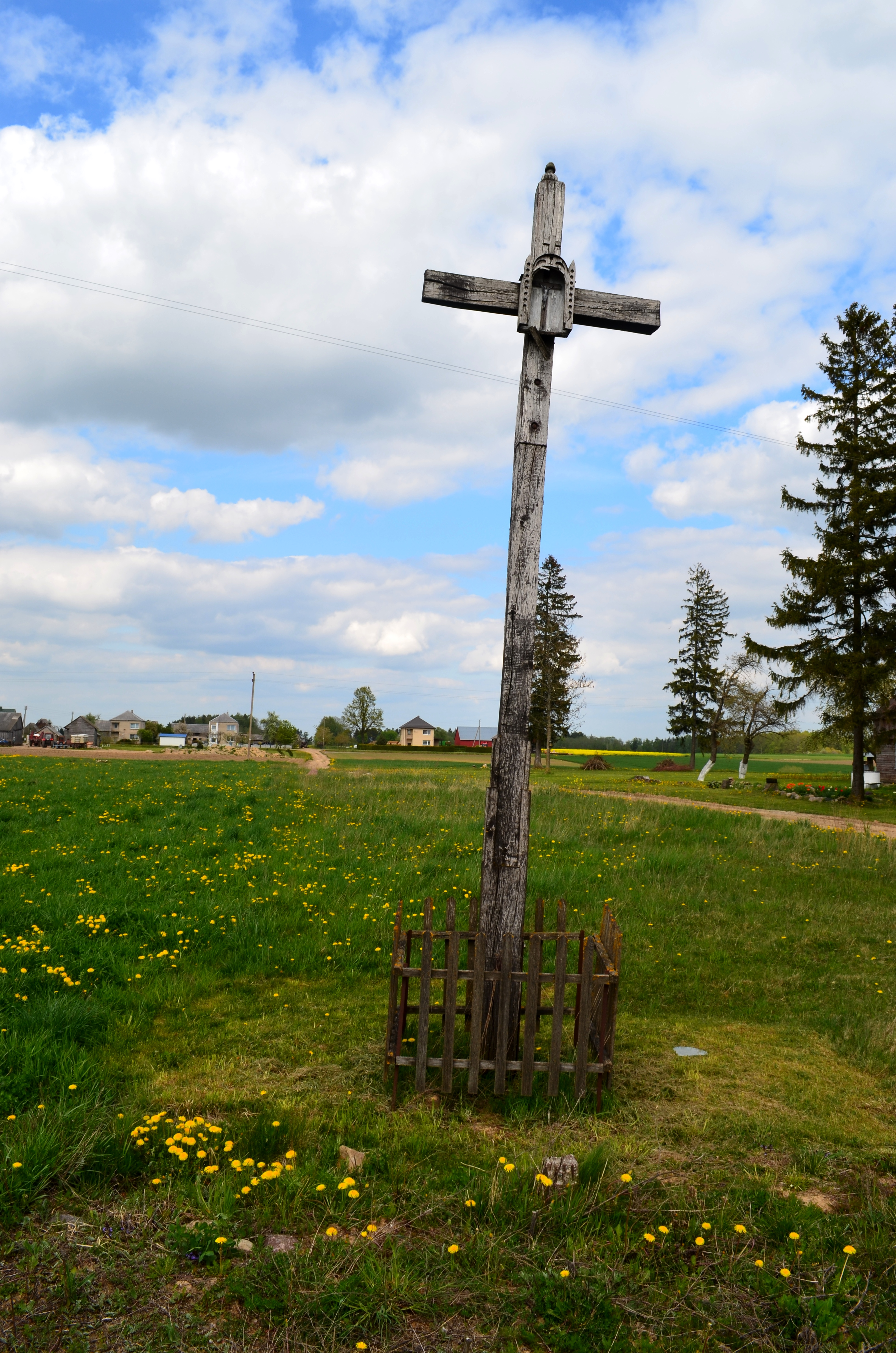 Kubilių kryžius, Šakių raj.